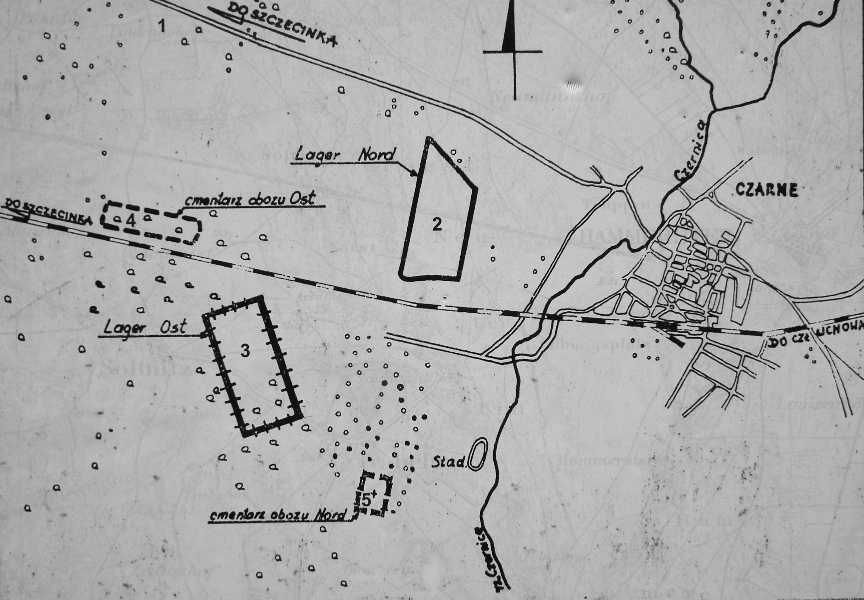 Dawny Stalag IIB w Czarnem (Hammerstein). Tablica pamiątkowa z planem obozu.